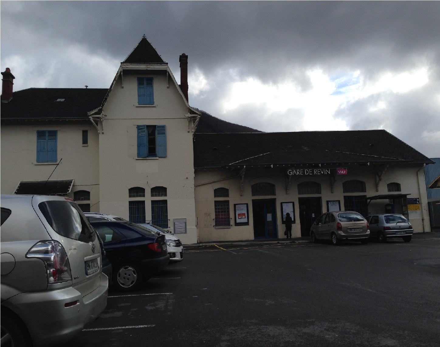 Gare de Revin sous la nuage (2015)